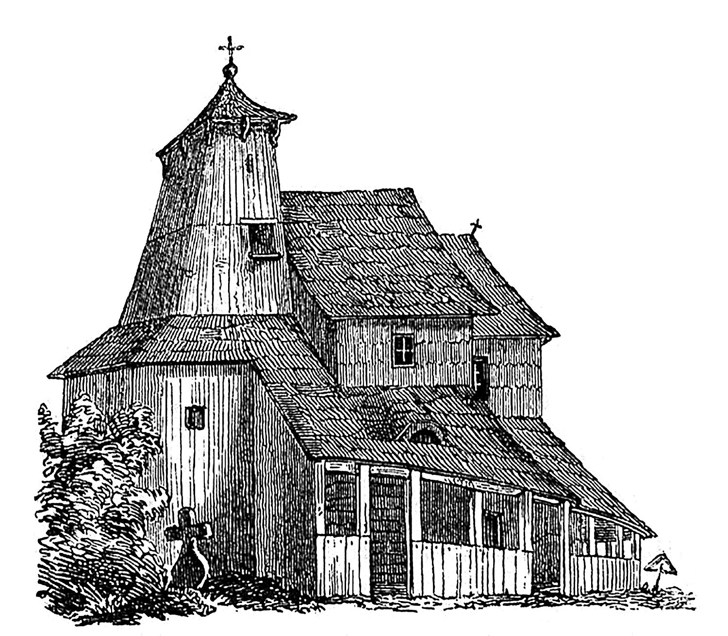 Kresba dnes již neexistujícího dřevěného kostela v Kopřivnici. Datace a původ je neznámý.